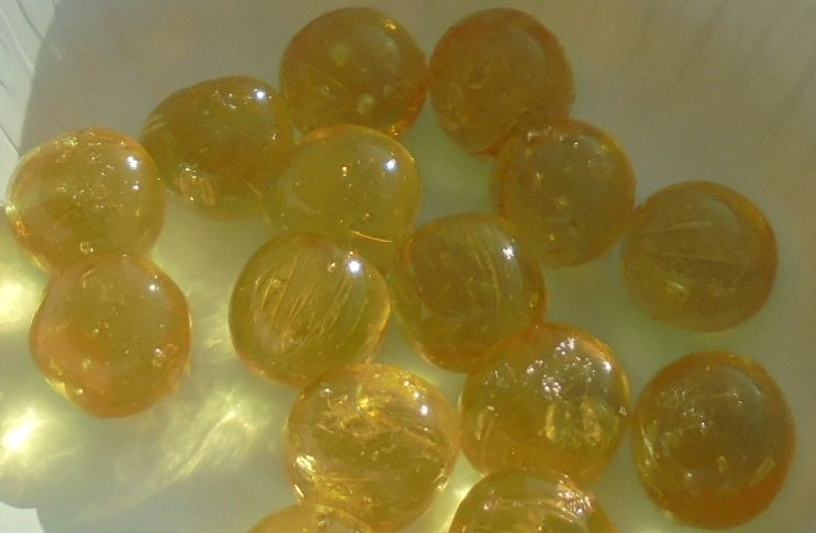 澤の露 (Candy)